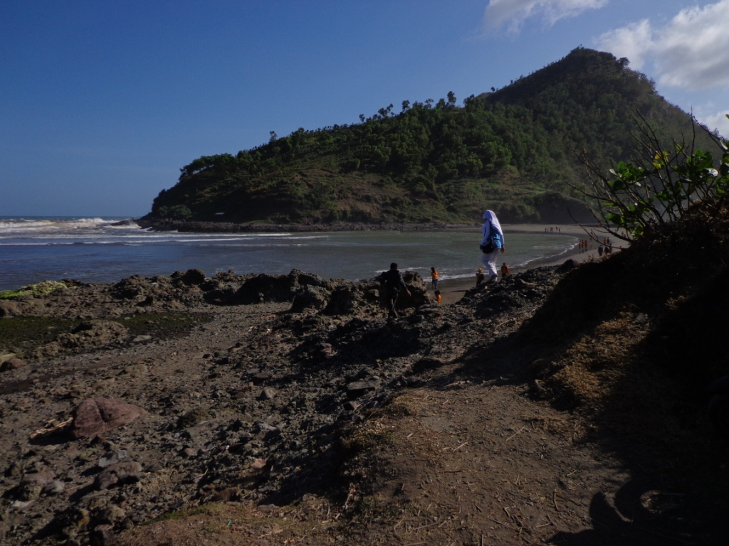 Ini adalah Pantai Karang Bolong yang terletak di Kabupaten Kebumen pada bulan Juli tahun 2012